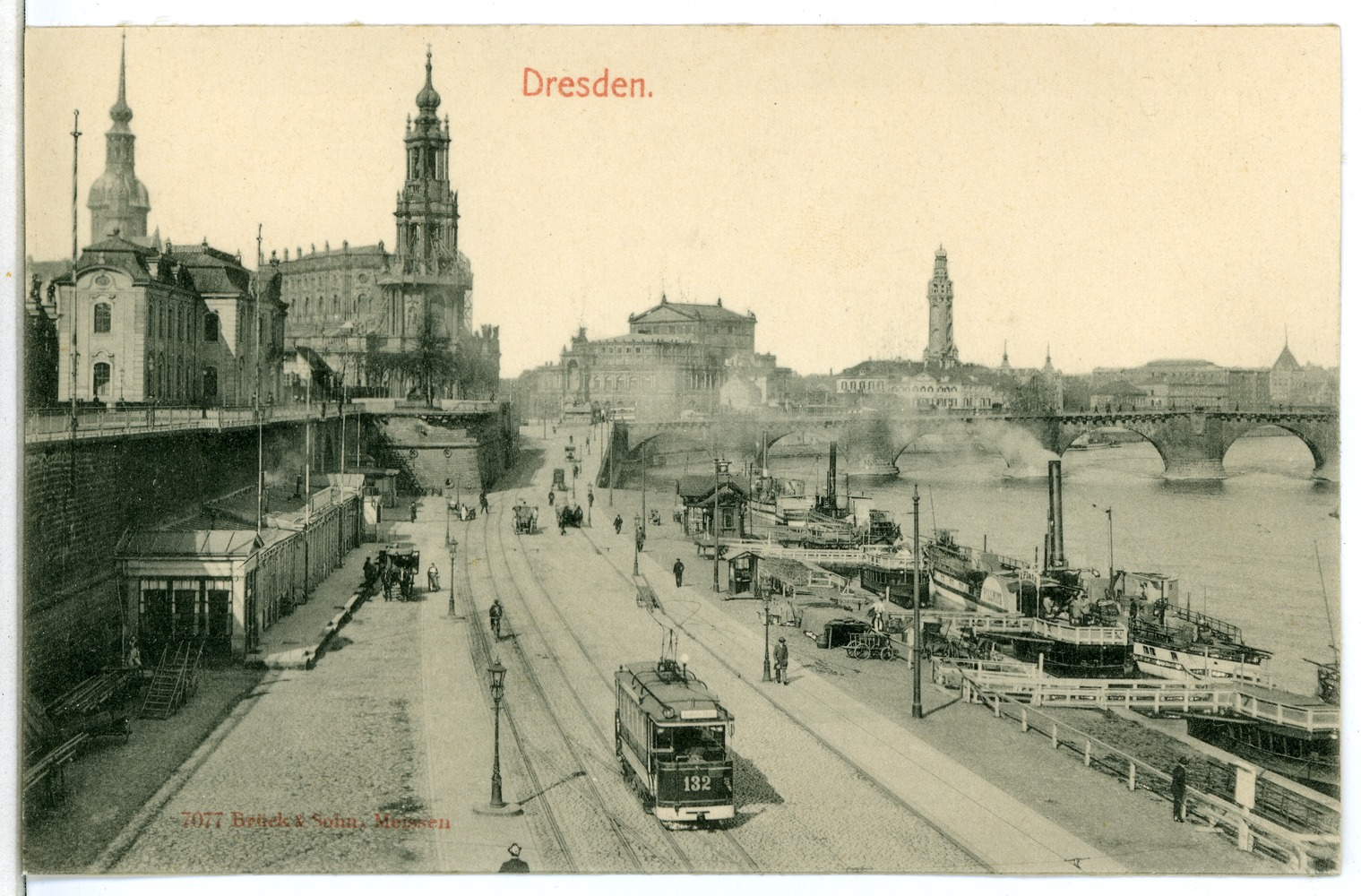 Dresden; Brühlsche Terrasse und Dampferanlagestelle This postcard is from publisher Brück & Sohn in Meißen ( This postcard has a unique number 07077 and is available in a higher resolution at the publisher. This images was uploaded in a cooperation project between Wikipedians and the publisher.